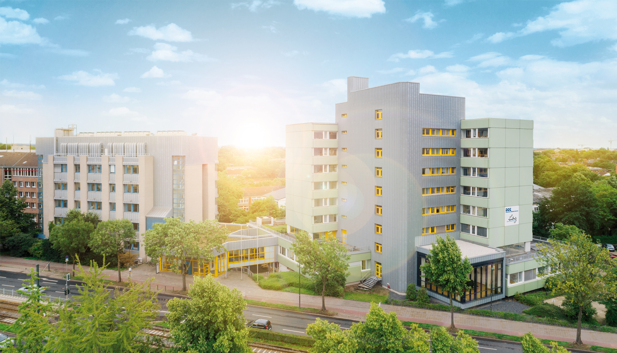 Außenansicht des DDZ-Gebäudes